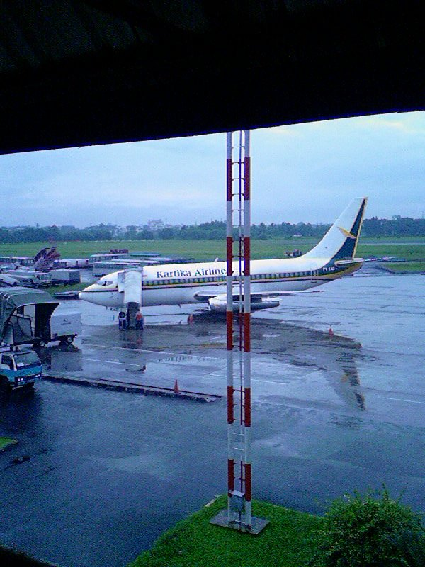 Kartika Airlines at Polonia Airport, Medan, Indonesia. December 2006.